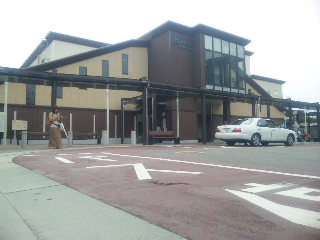 魚住駅北口。